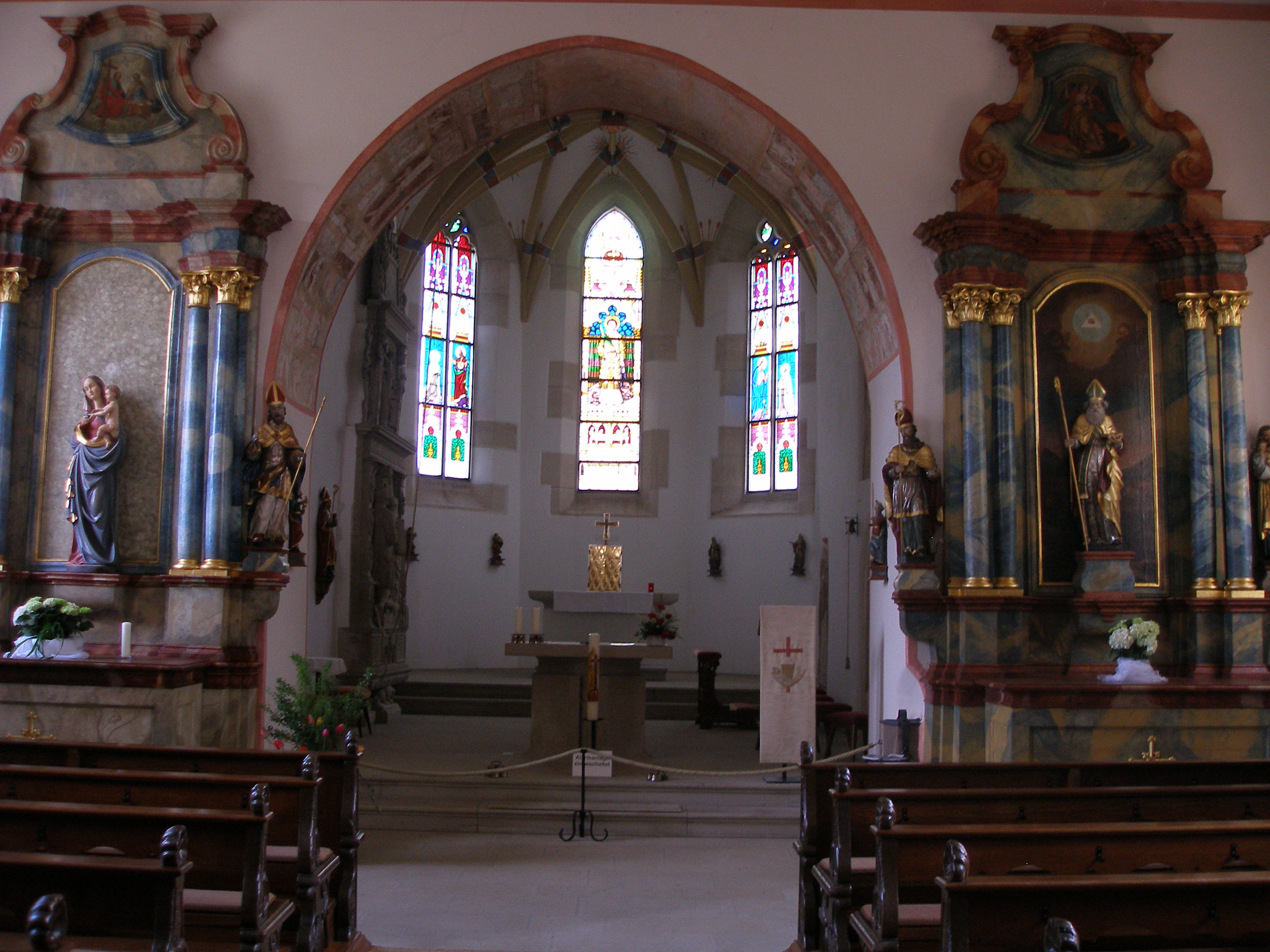 Straßdorf Alte Kirche